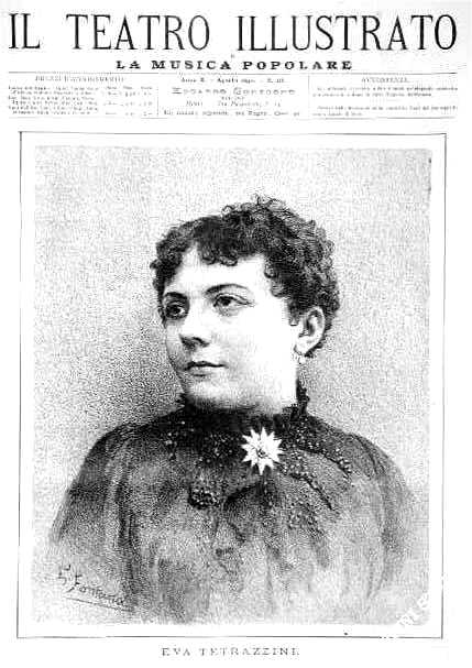 Eva Tetrazzini (1862-1938) ritratta da F. Fontana per "Il Teatro illustrato- La musica popolare" del dicembre 1890 - editore Edoardo Sonzogno